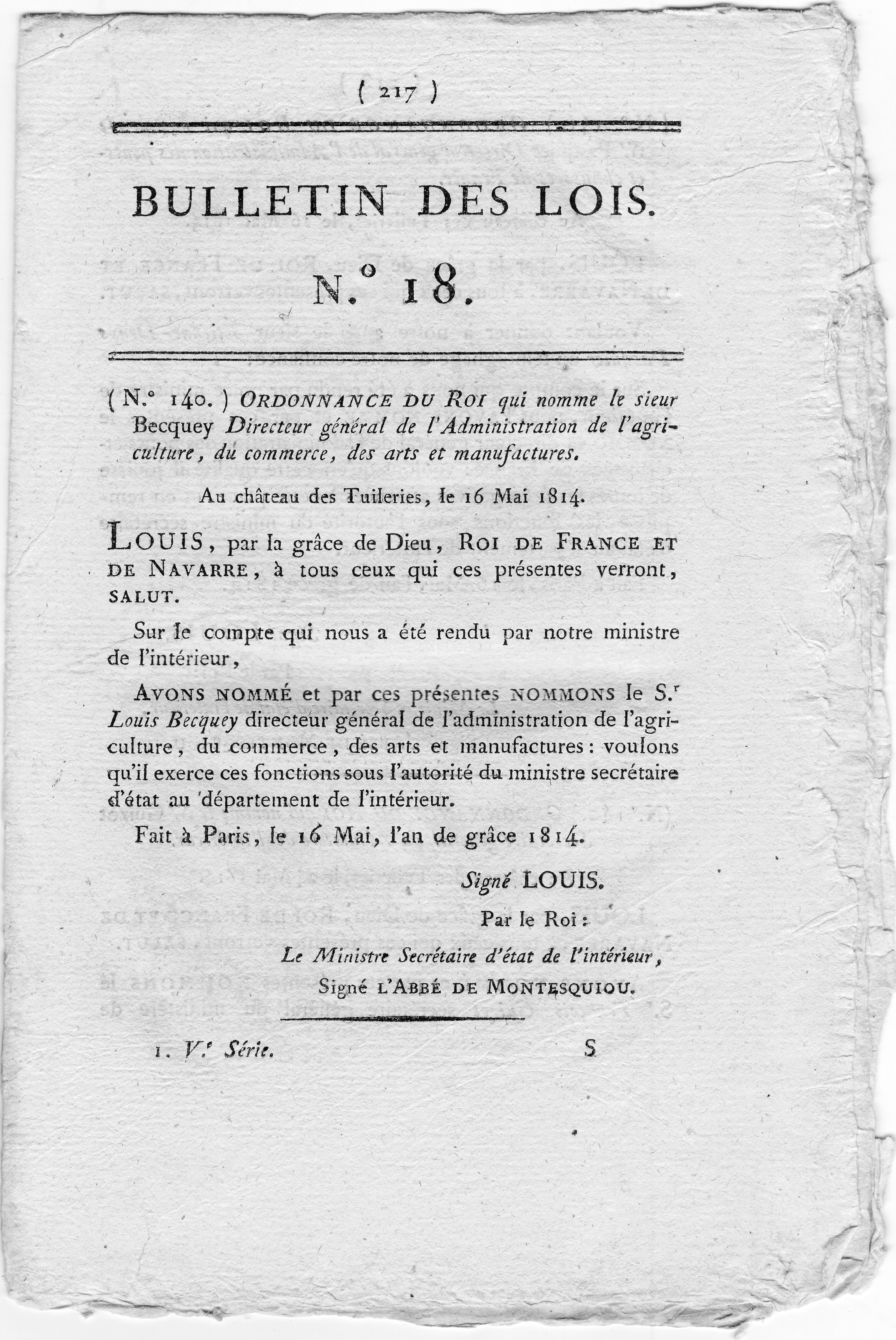 Ordonnance du 16 mai 1814 nommant Louis Becquey directeur général de l'agriculture, du commerce, des arts et manufactures.